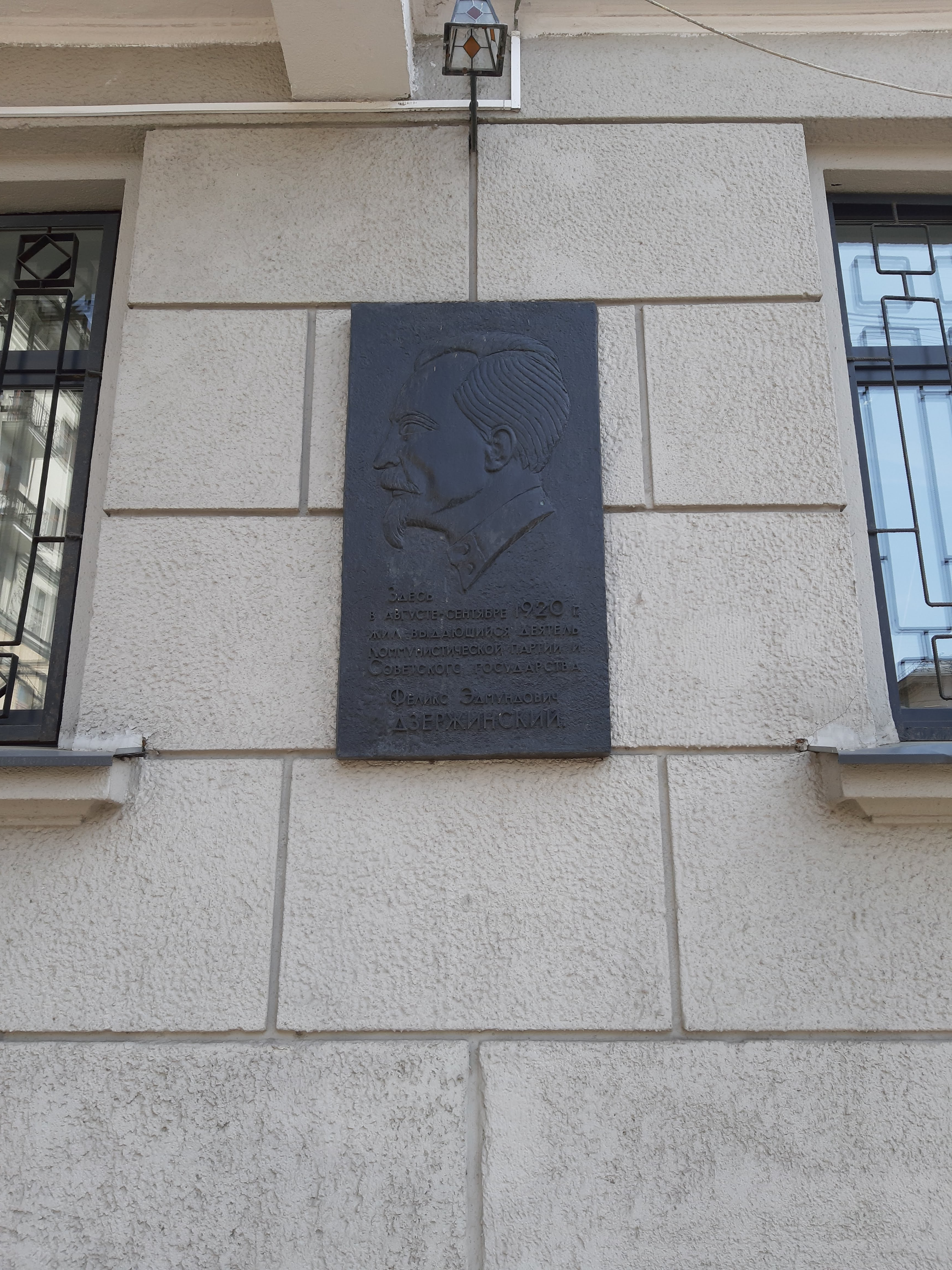 Мінск. Ад пл. Незалежнасці да Залатой Горкі